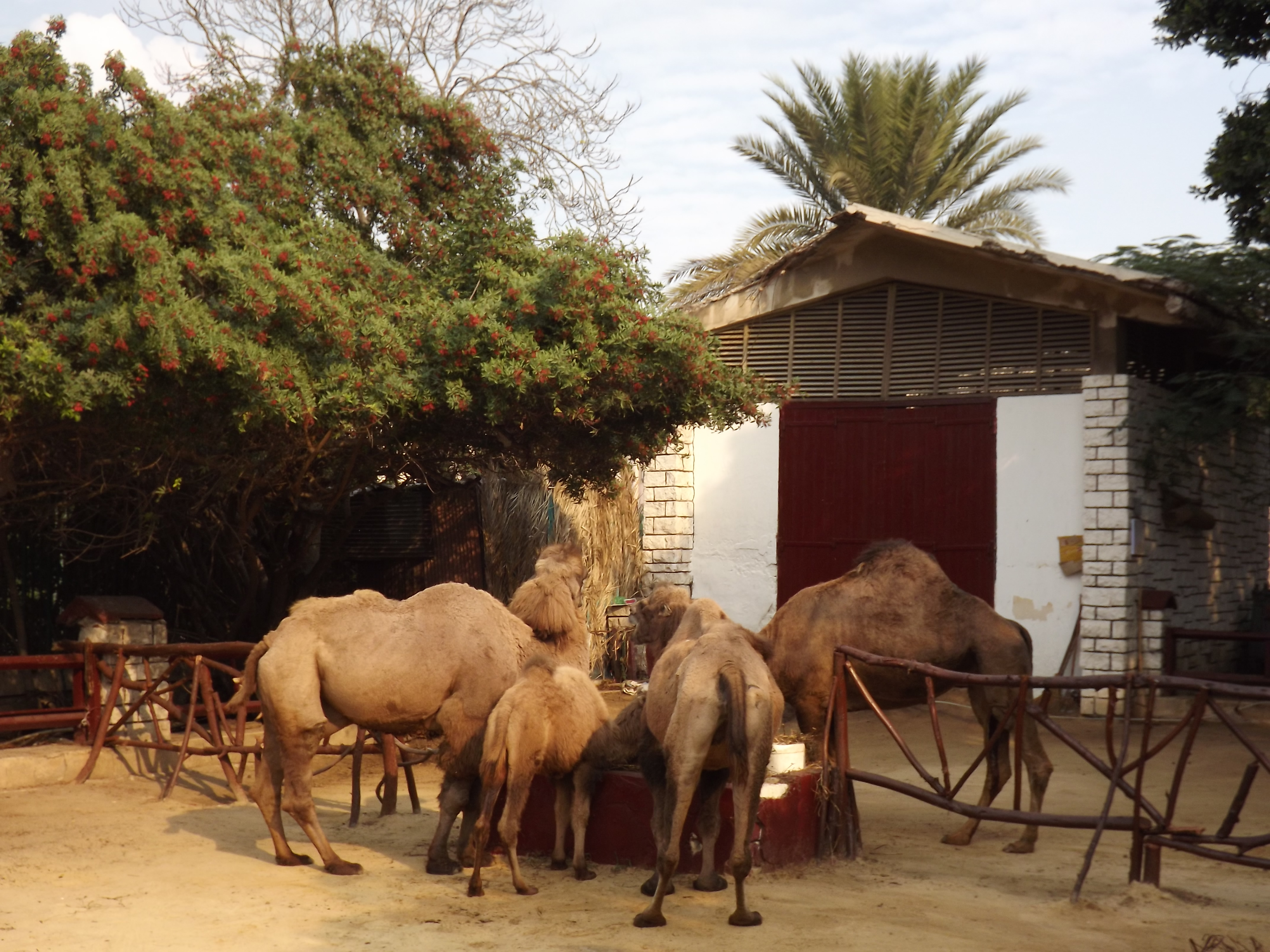 جمل مغربي في حديقة حيوان النزهة - الاسكندرية